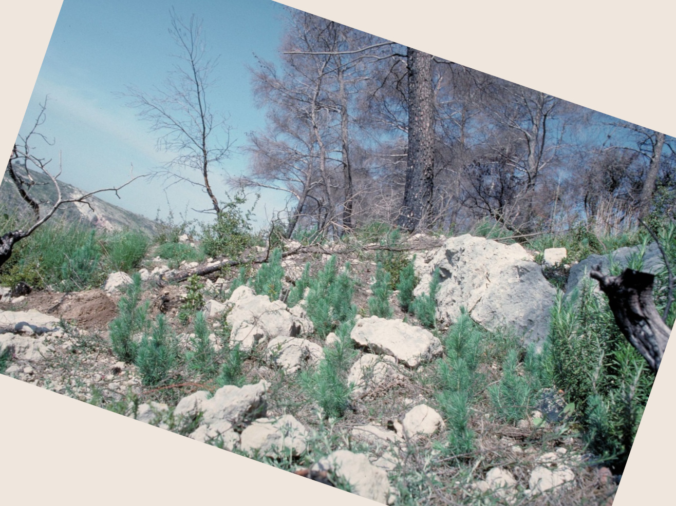 Colonisation de sols incendiés après les feux